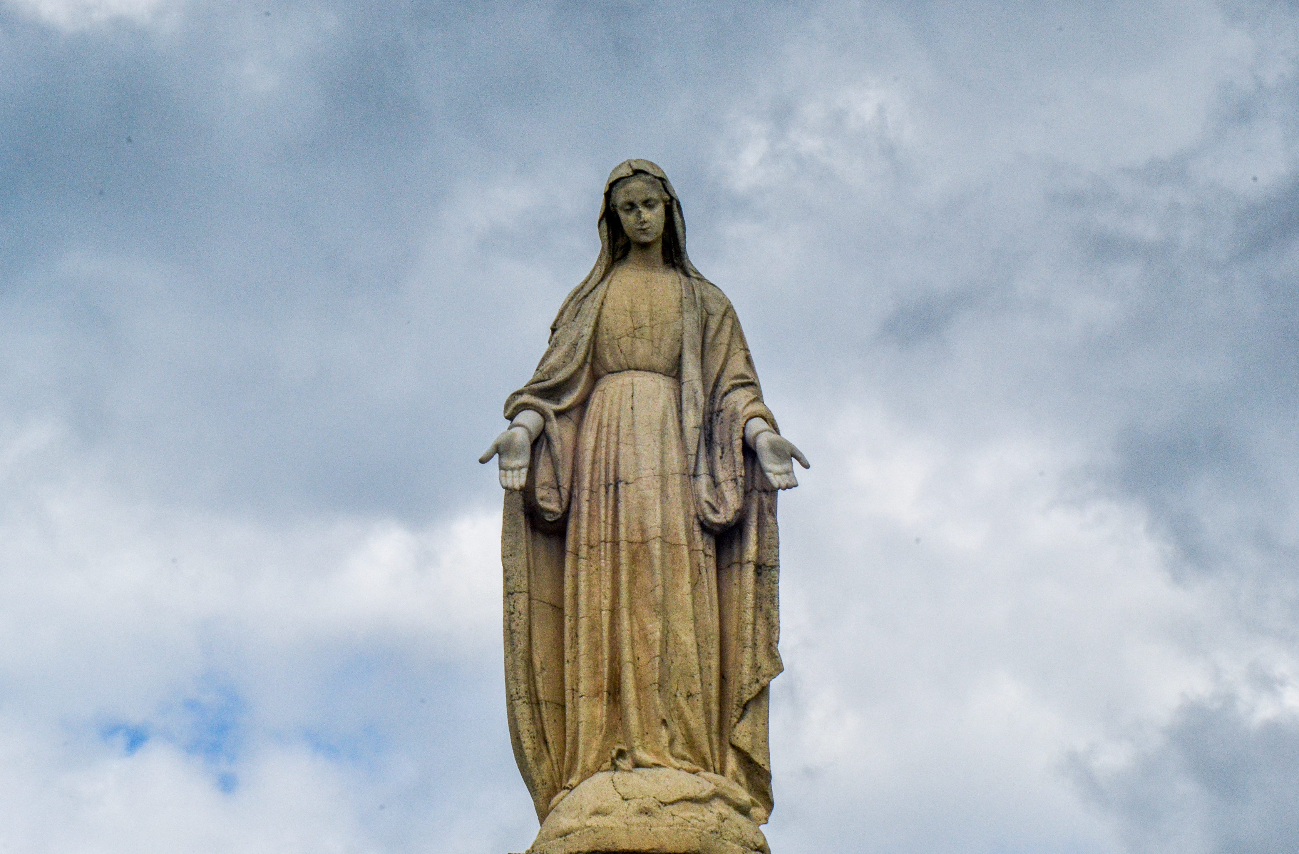 Vue de face de la Madone de Saint-Héand.